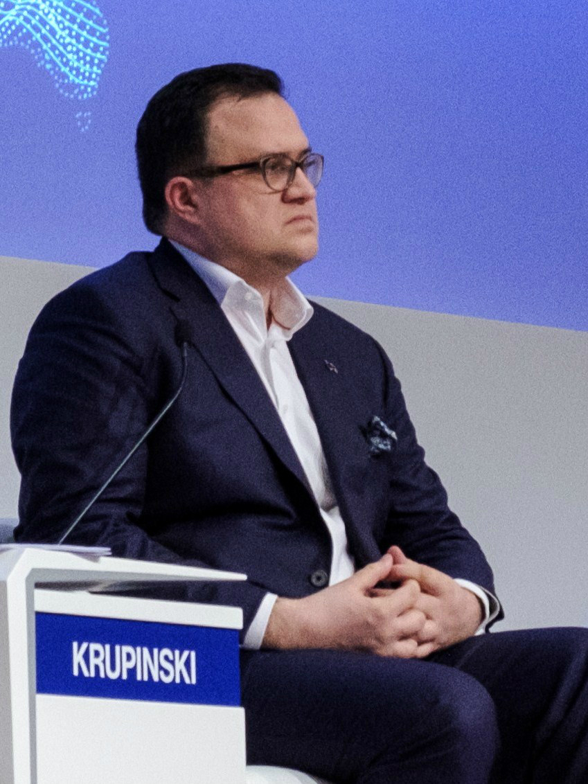 Michał Krupiński, ekonomista, bankowiec.